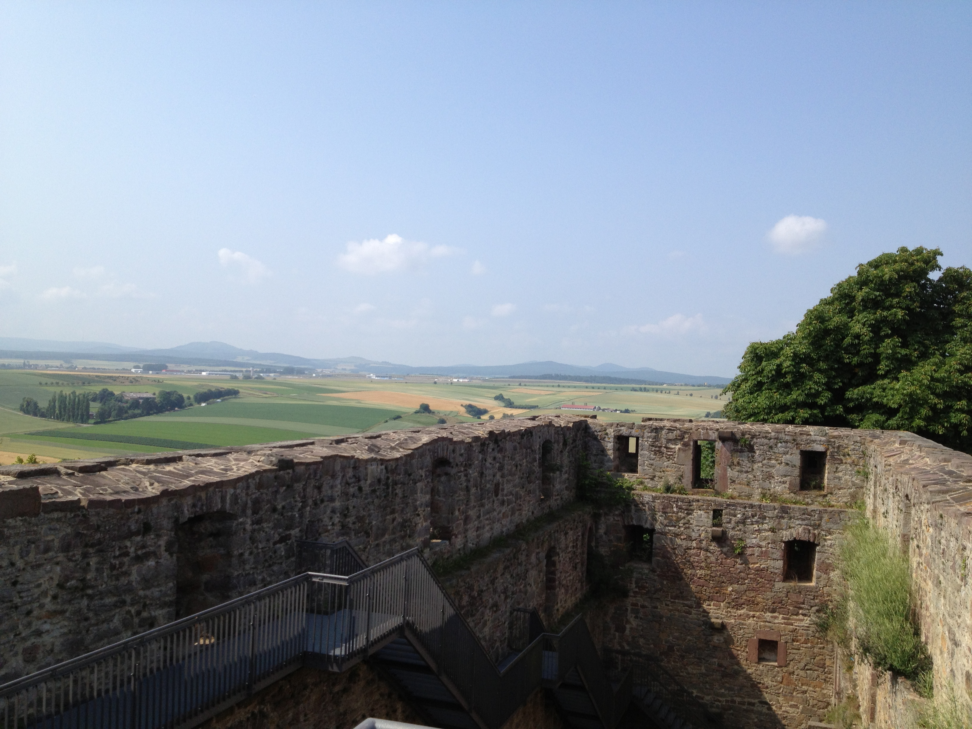 Blick von der Burgruine Grebenstein auf den neuen Flughafen Kassel-Calden